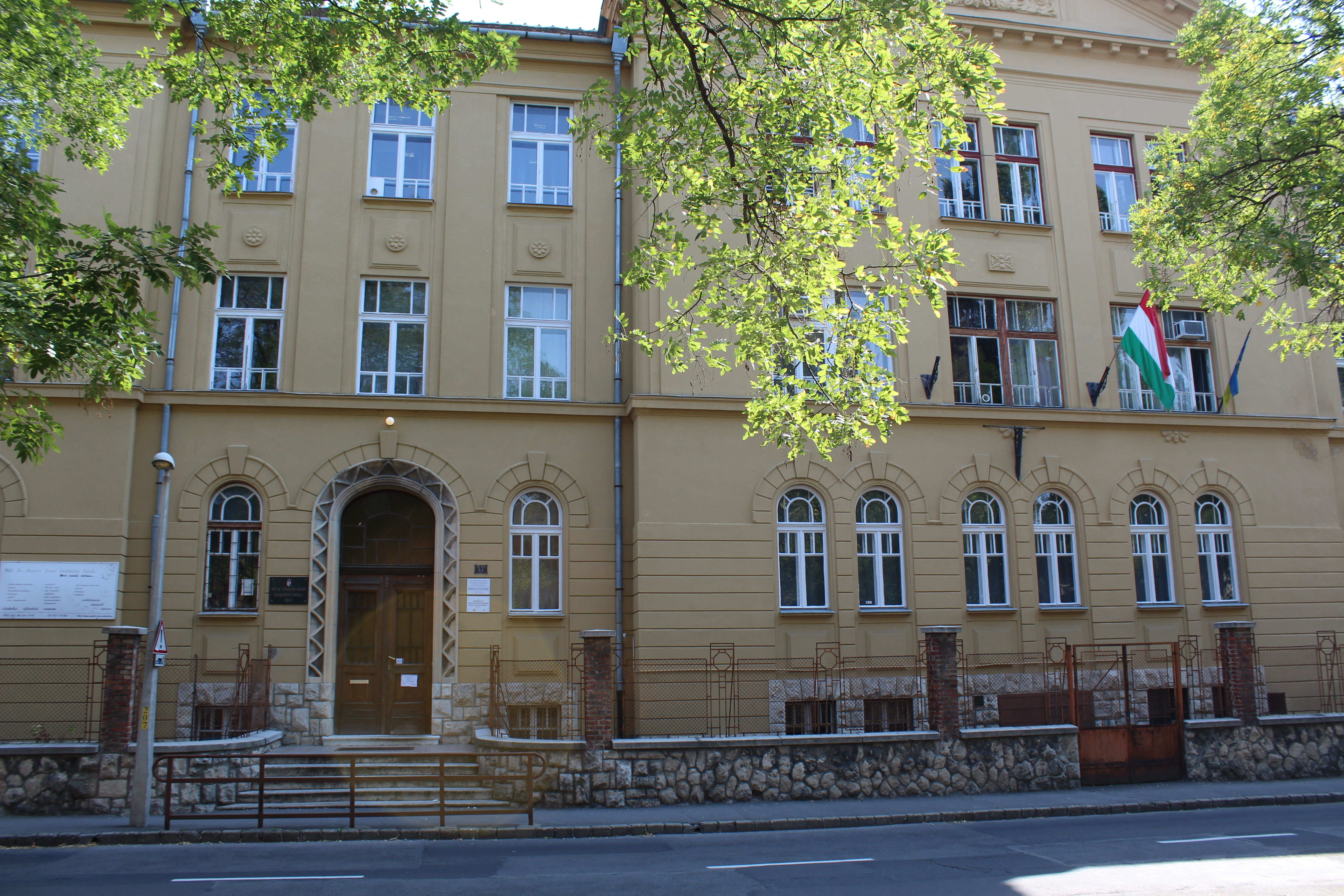 Az 500. Számú Angster József Szakképző Iskola 2016-ban